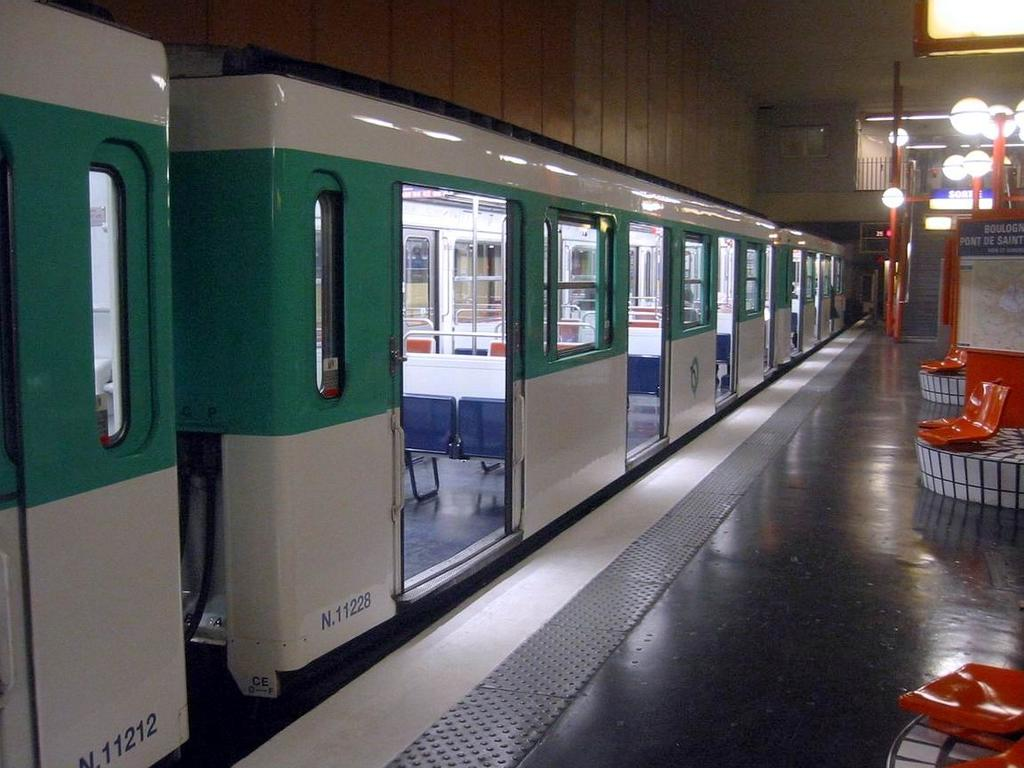 Station Boulogne-Pont de Saint-Cloud sur la ligne 10